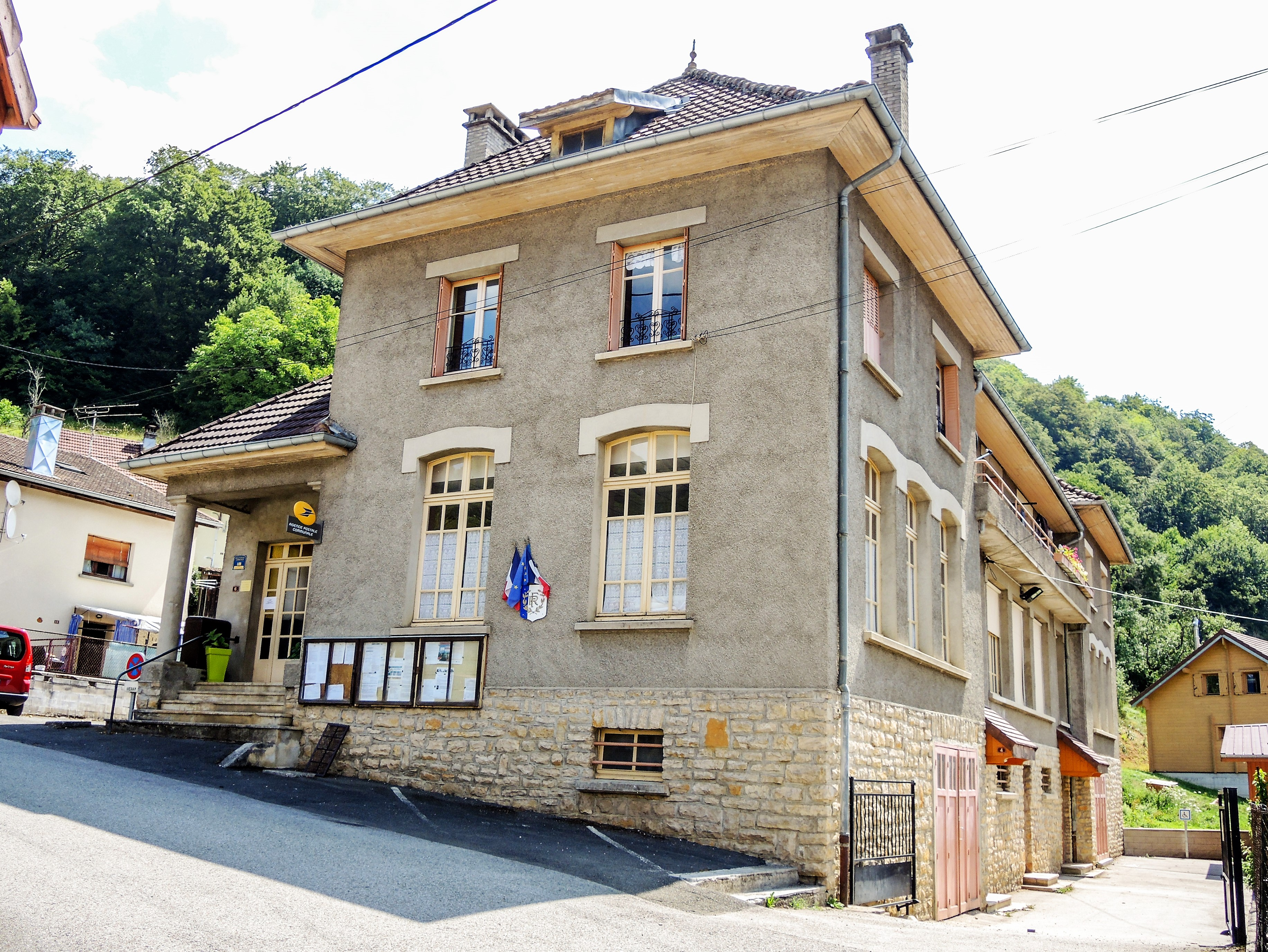 Mairie-école de Vaufrey. Doubs